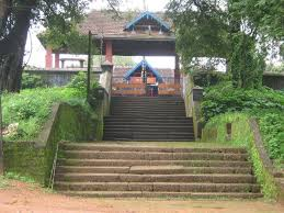 കോങ്ങാട് വലിയകാവ്‌ തിരുമാധാംകുന്നു ക്ഷേത്രം